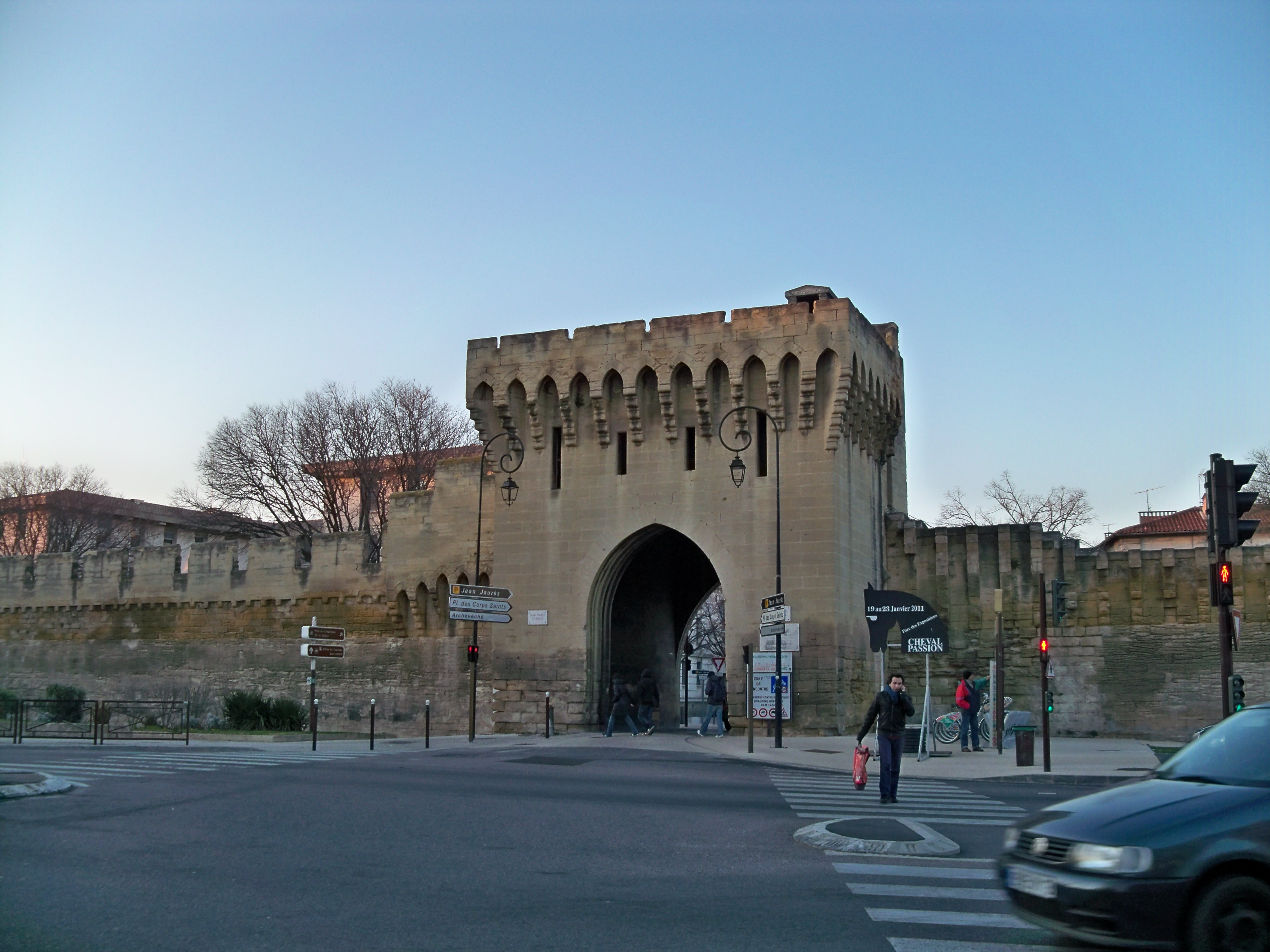 Porte Saint Michel des remparts d'Avignon, Vaucluse, France